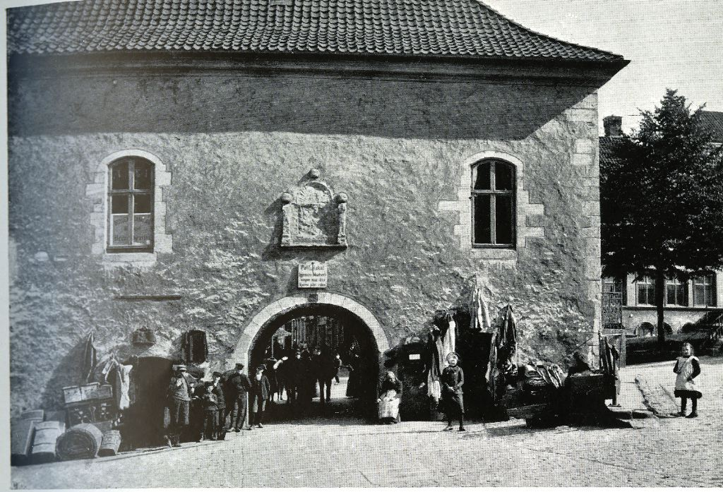 Murhvelvingen, bildet tatt før 1916